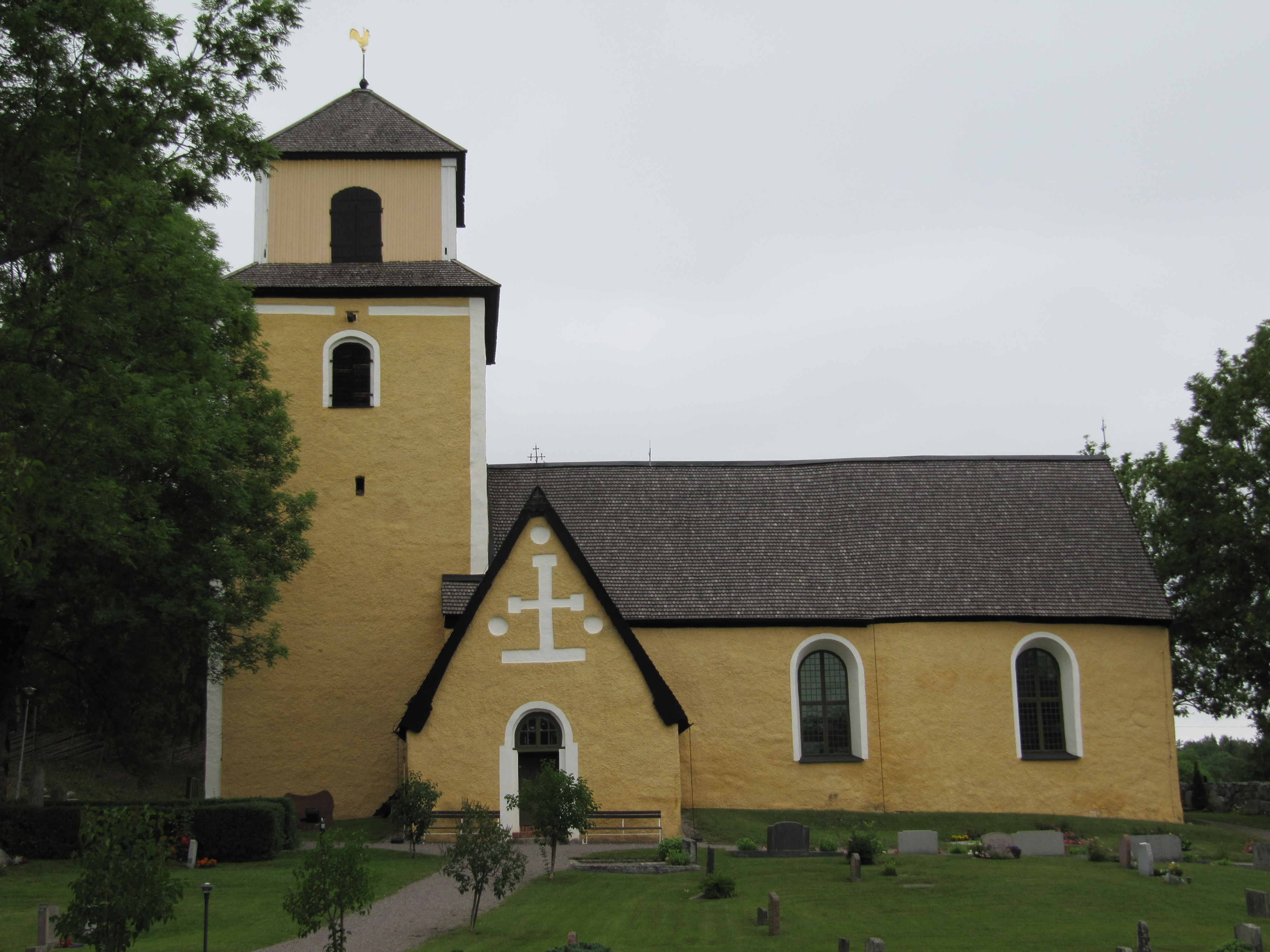 Häggeby kyrka